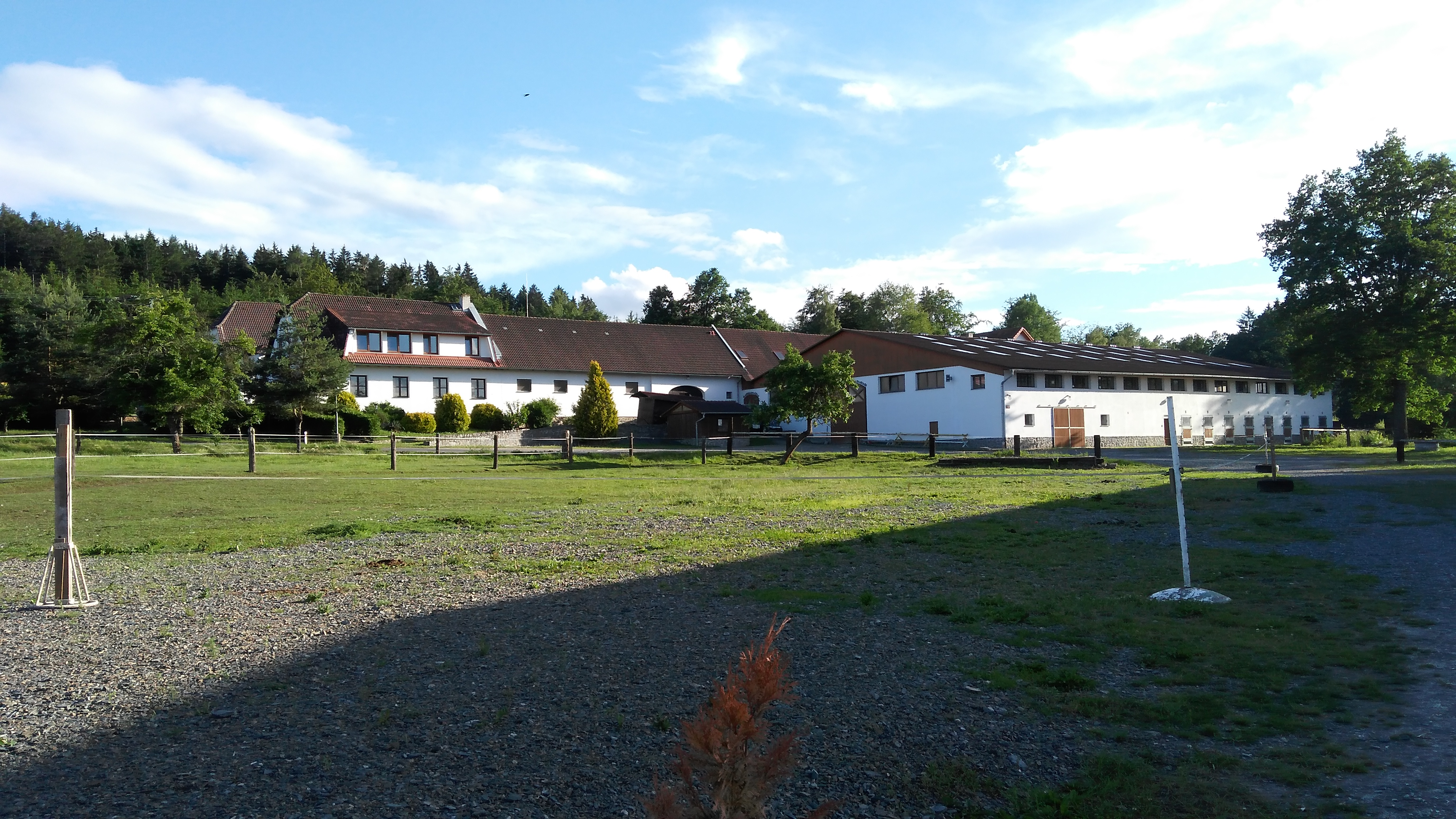 Heroutice